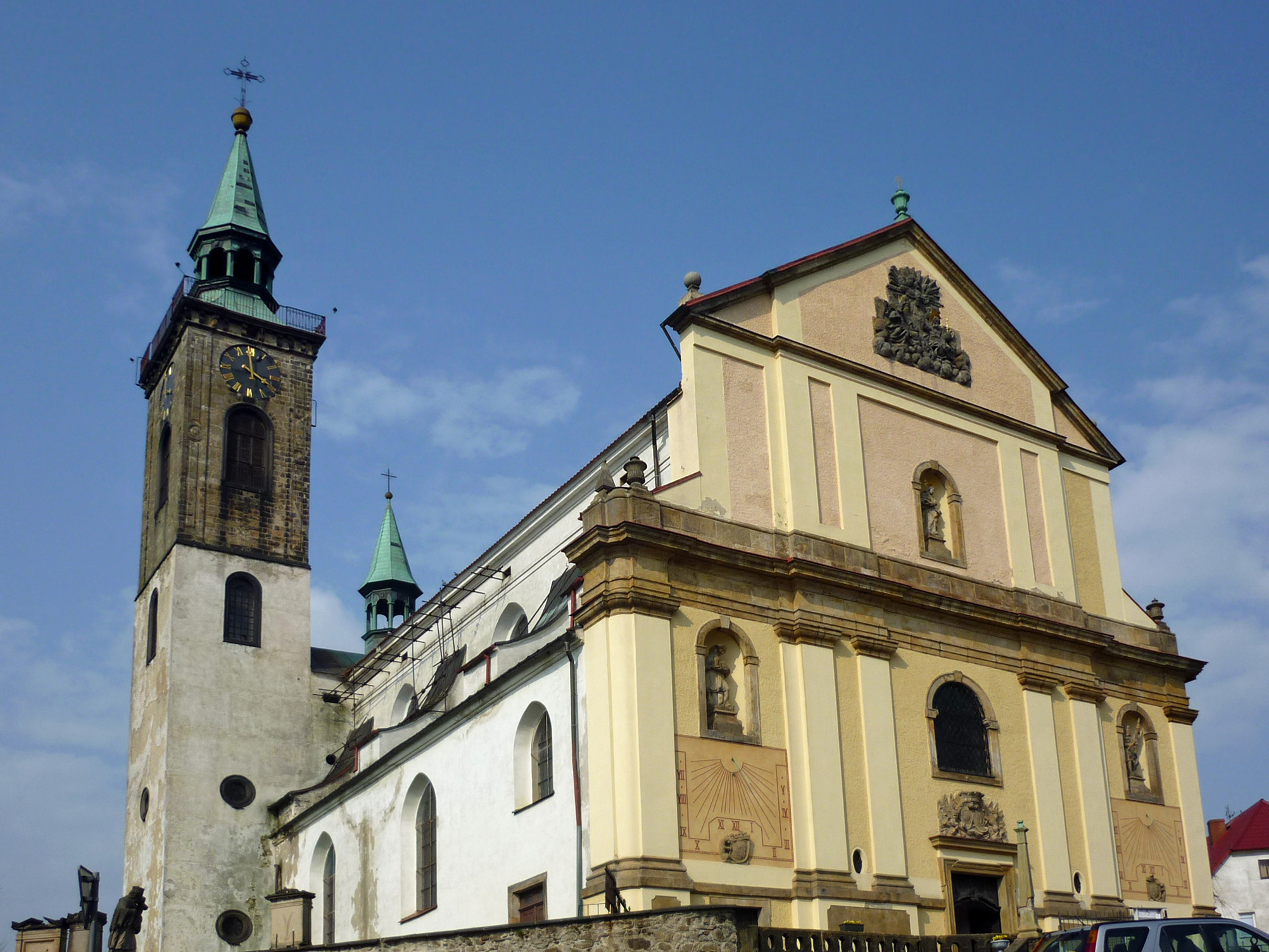 Pfarrkirche Hl. Nikolaus in Nixdorf (Mikulášovice)